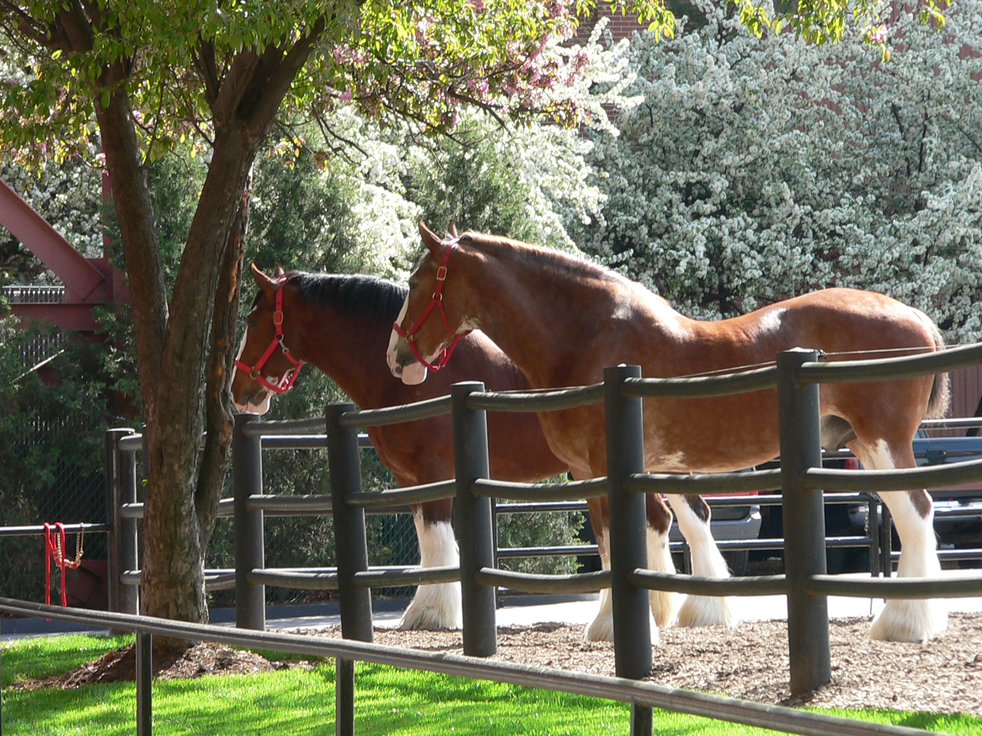 Anhueser Busch ClydesdalesP1020190